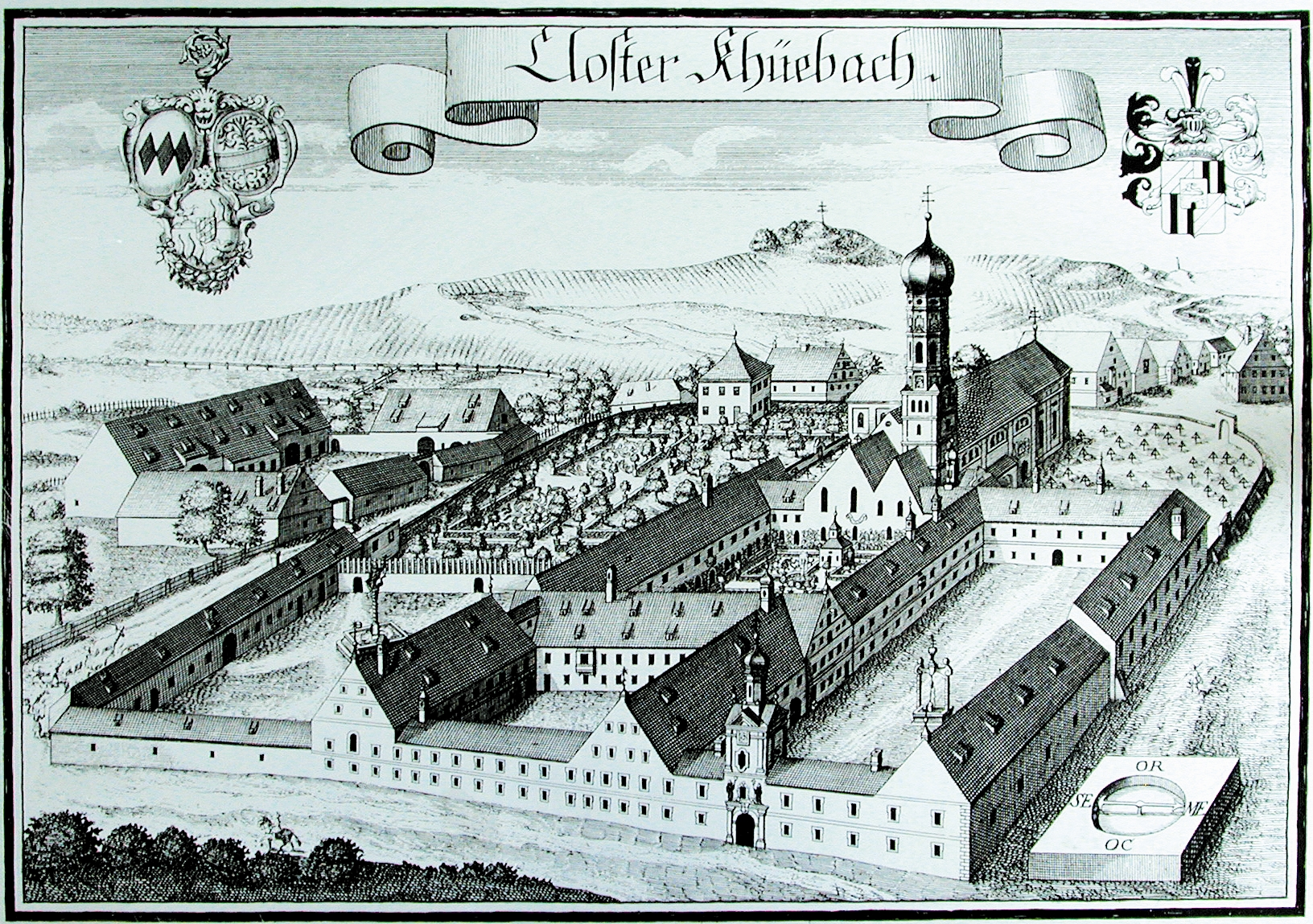 Kupferstich von Michael Wening: Closter Khüebach.